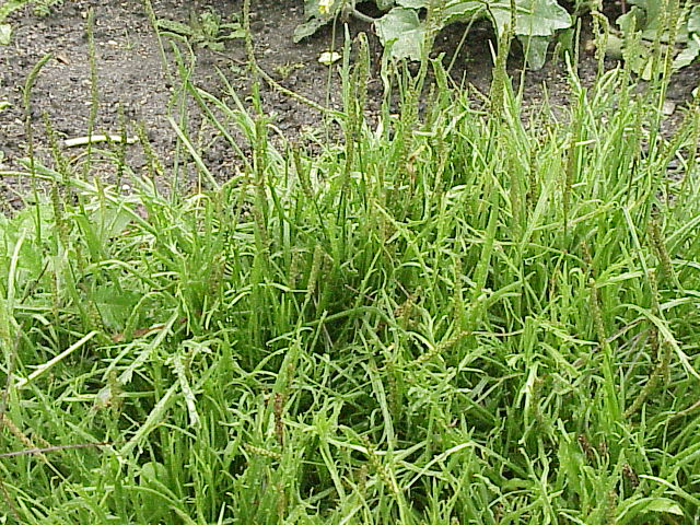 Species: Plantago coronopus Family: Plantaginaceae Image No. 2